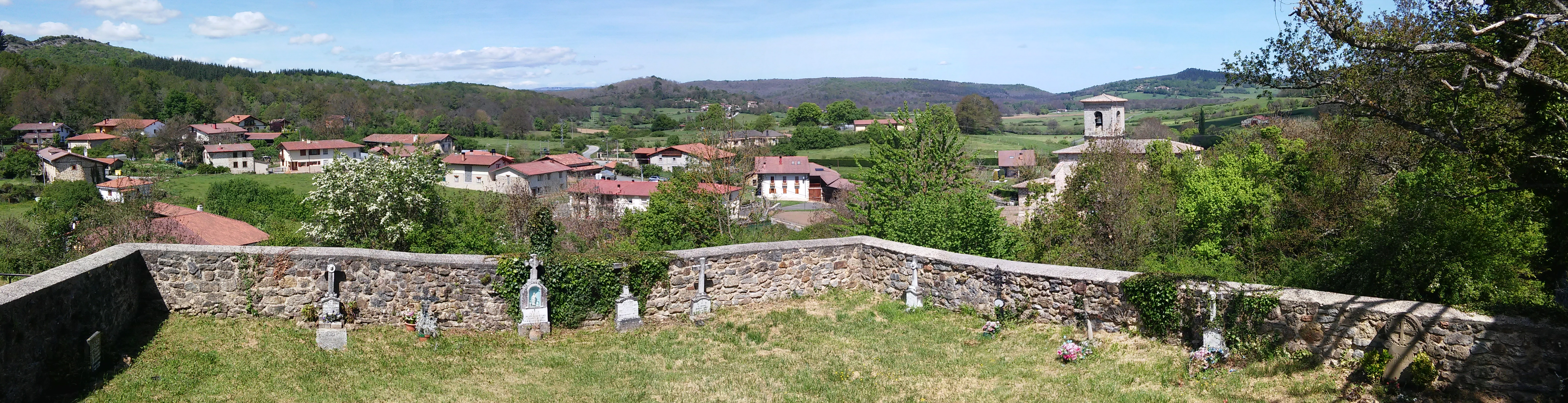 Aperregi hilerritik (Zuia, Araba)